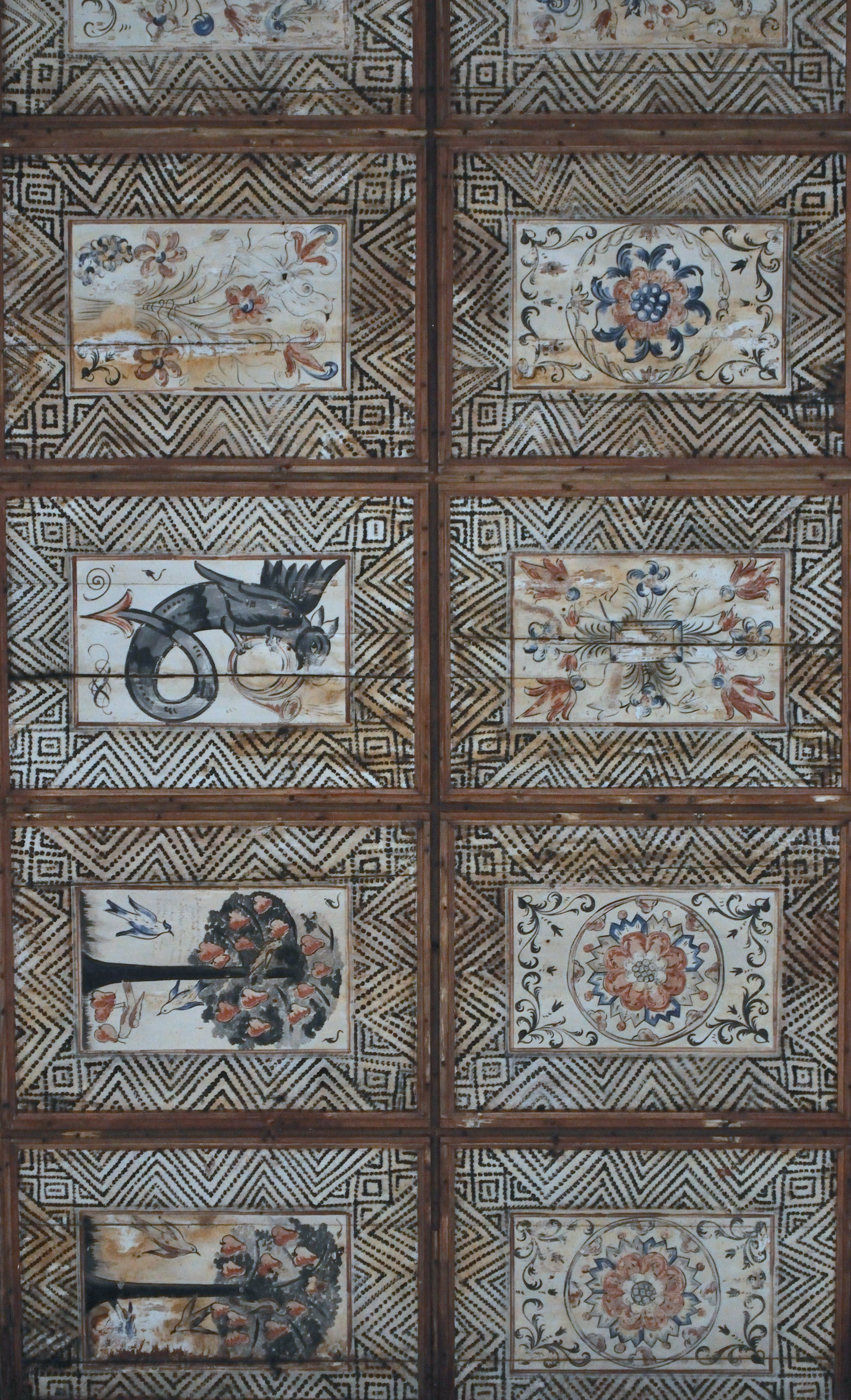 Biserica reformată din Huedin